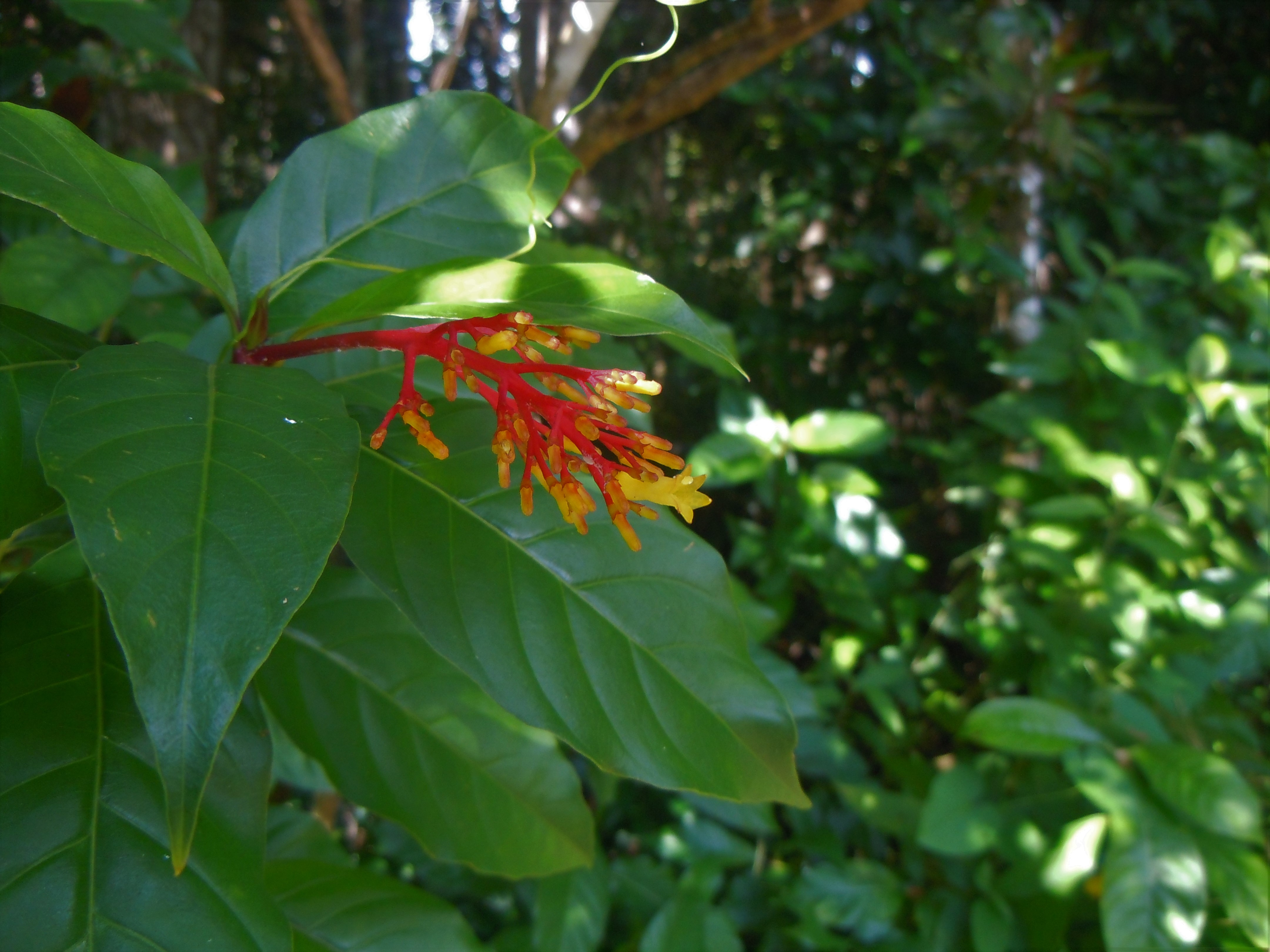 Palicourea croceoides, Forêt de Montravail, Martinique